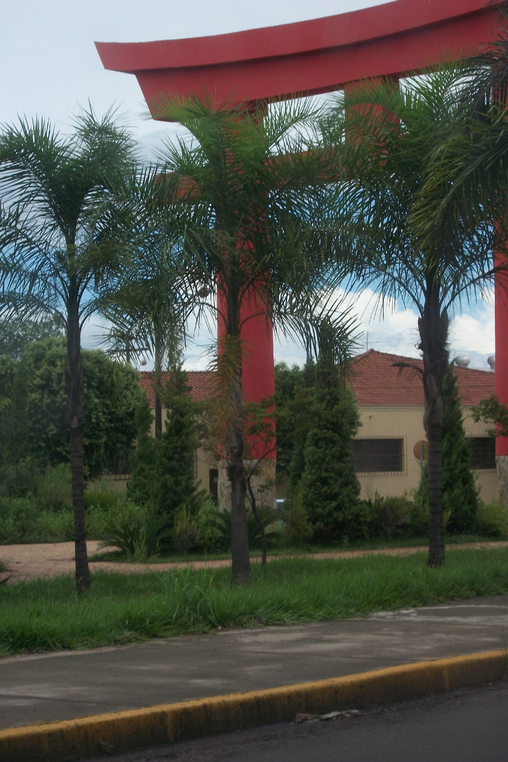 Torii localizado na Avenida dos Araçás, Araçatuba, São Paulo. Visto pelo lado oposto